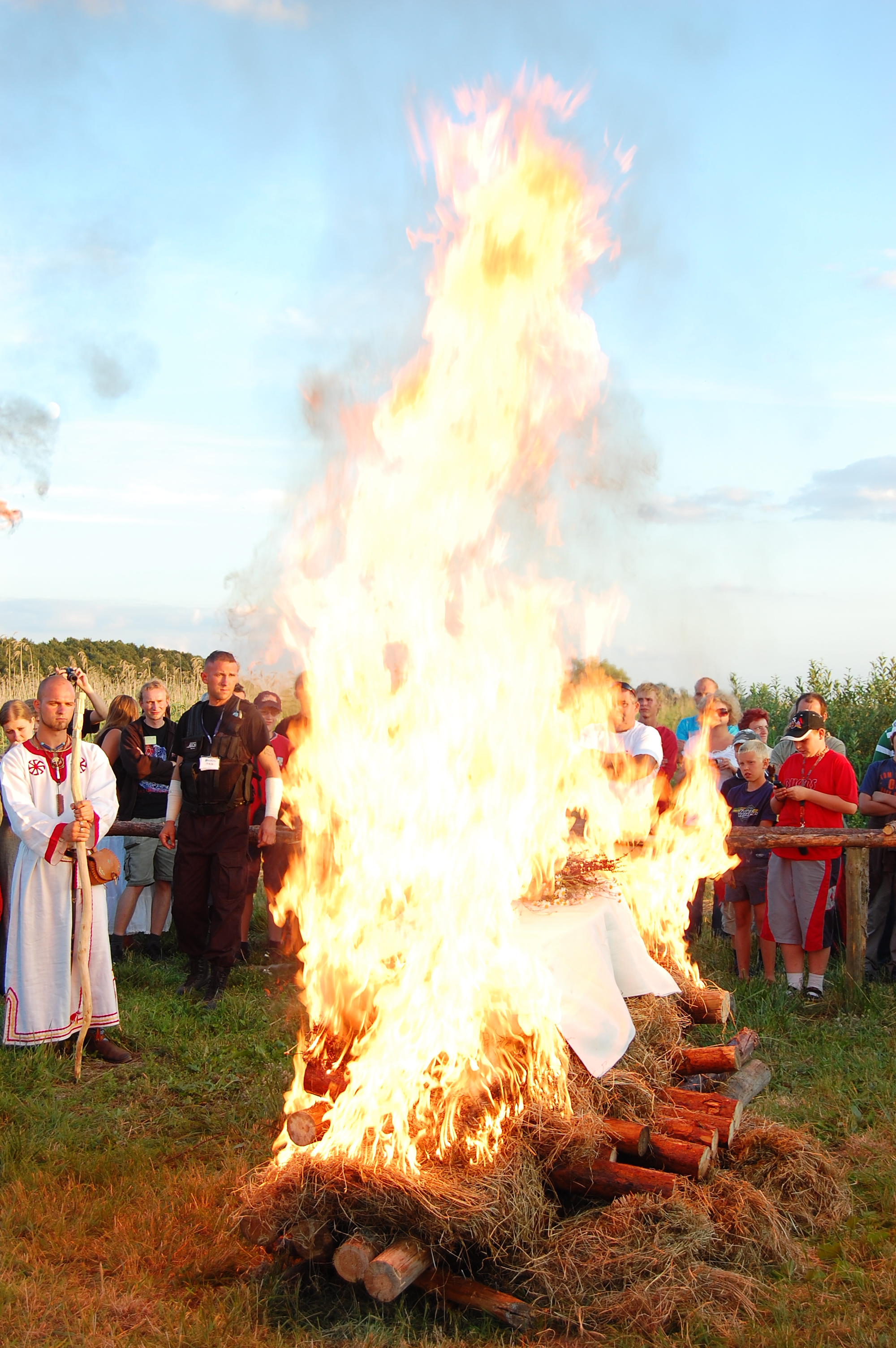 Pochówek ciałopalny na Festiwalu Słowian i Wikingów w 2009 roku w skansenie w Wolinie.